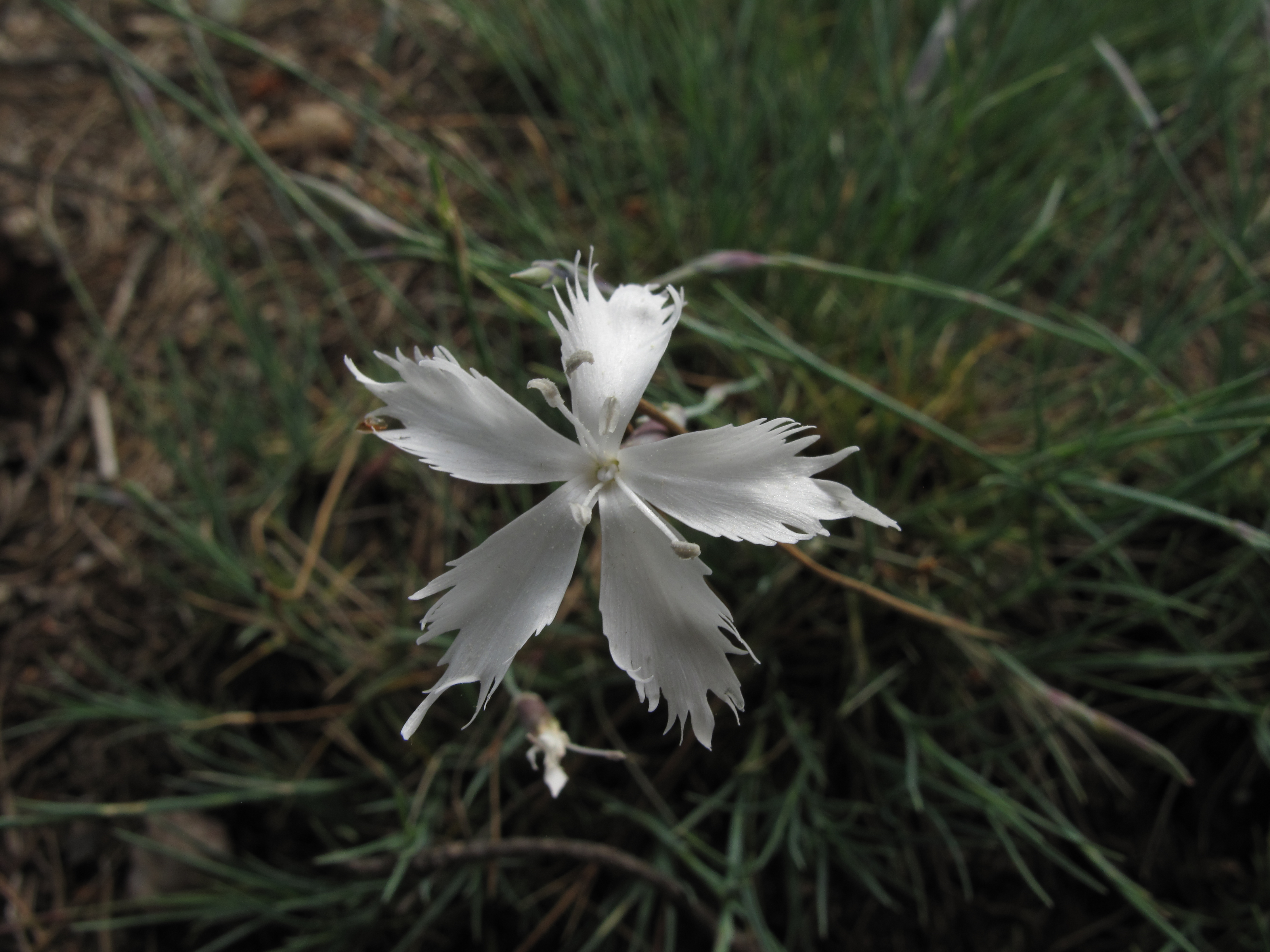 Květ hvozdíku písečného českého (Dianthus arenarius subsp. bohemicus) v národní přírodní památce Kleneč. Okres Litoměřice, Česká republika.